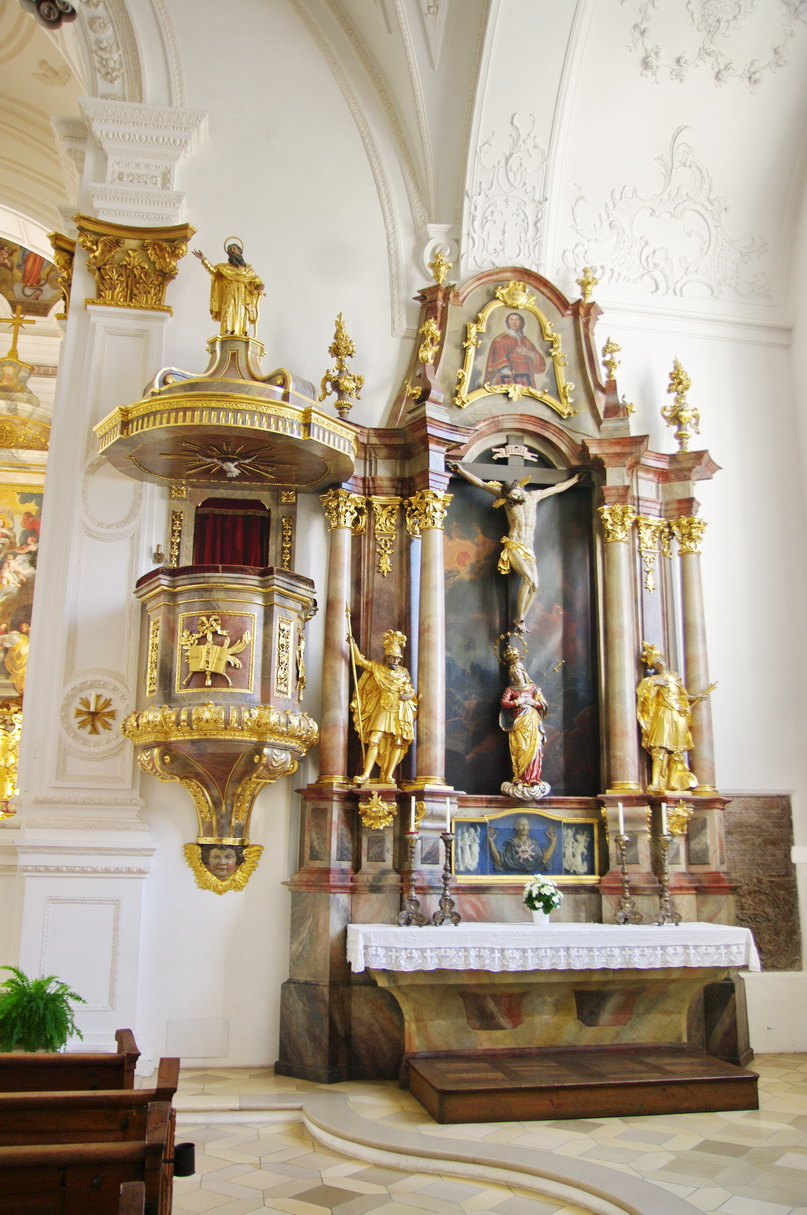 Kanzel Kirche Mariä Himmelfahrt, Marienplatz in Weilheim